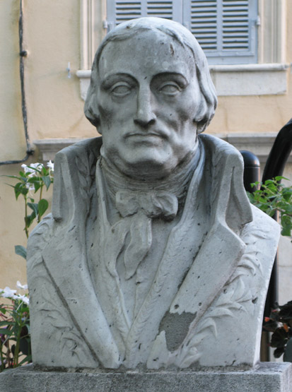 Buste en pierre de François-Juste-Marie Raynouard, historien, philologue romaniste et dramaturge français, par le sculpteur Victor Nicolas, sur la place Saint-Pierre de Brignoles (Var).